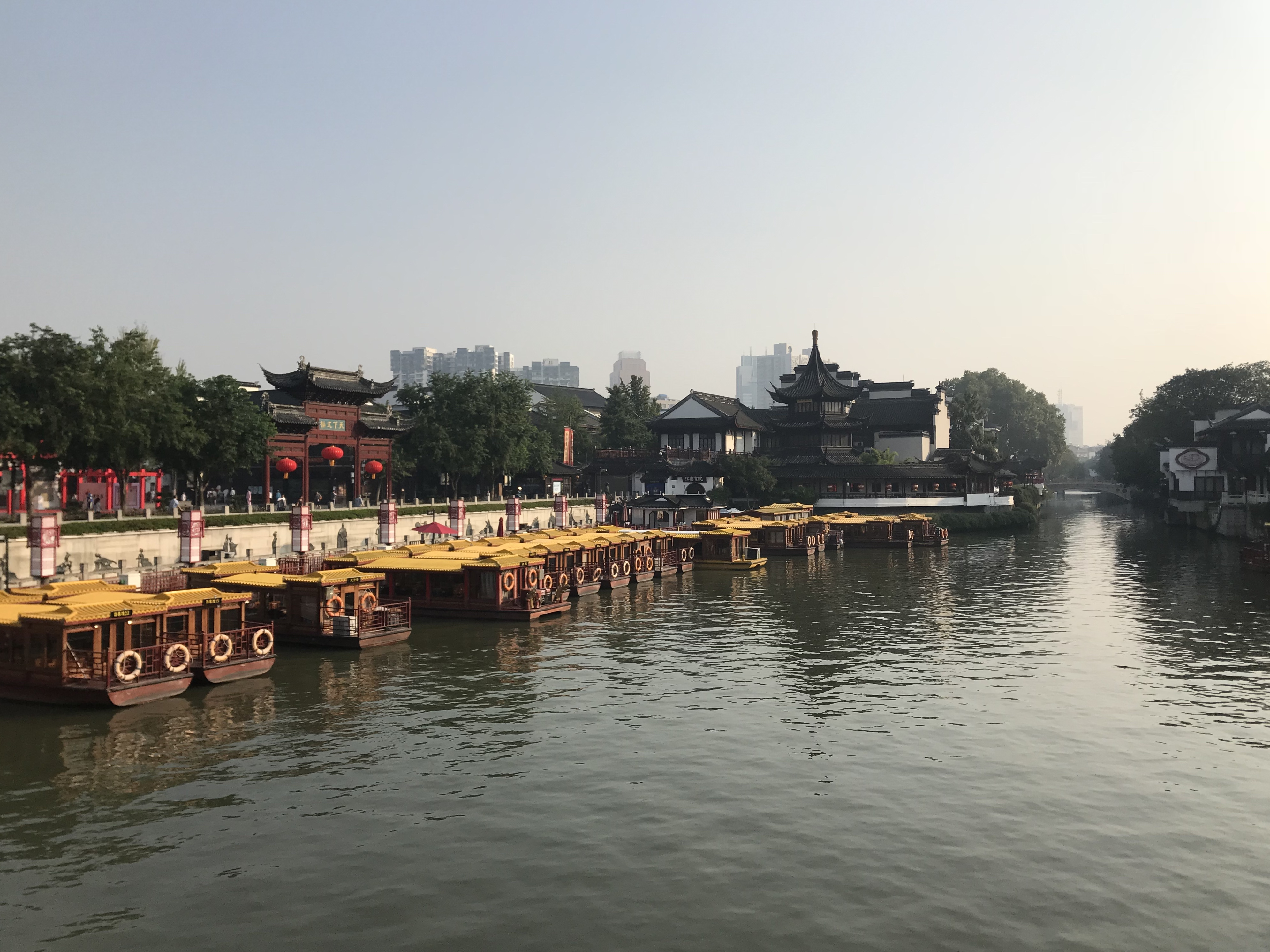 夫子廟の前の秦淮河